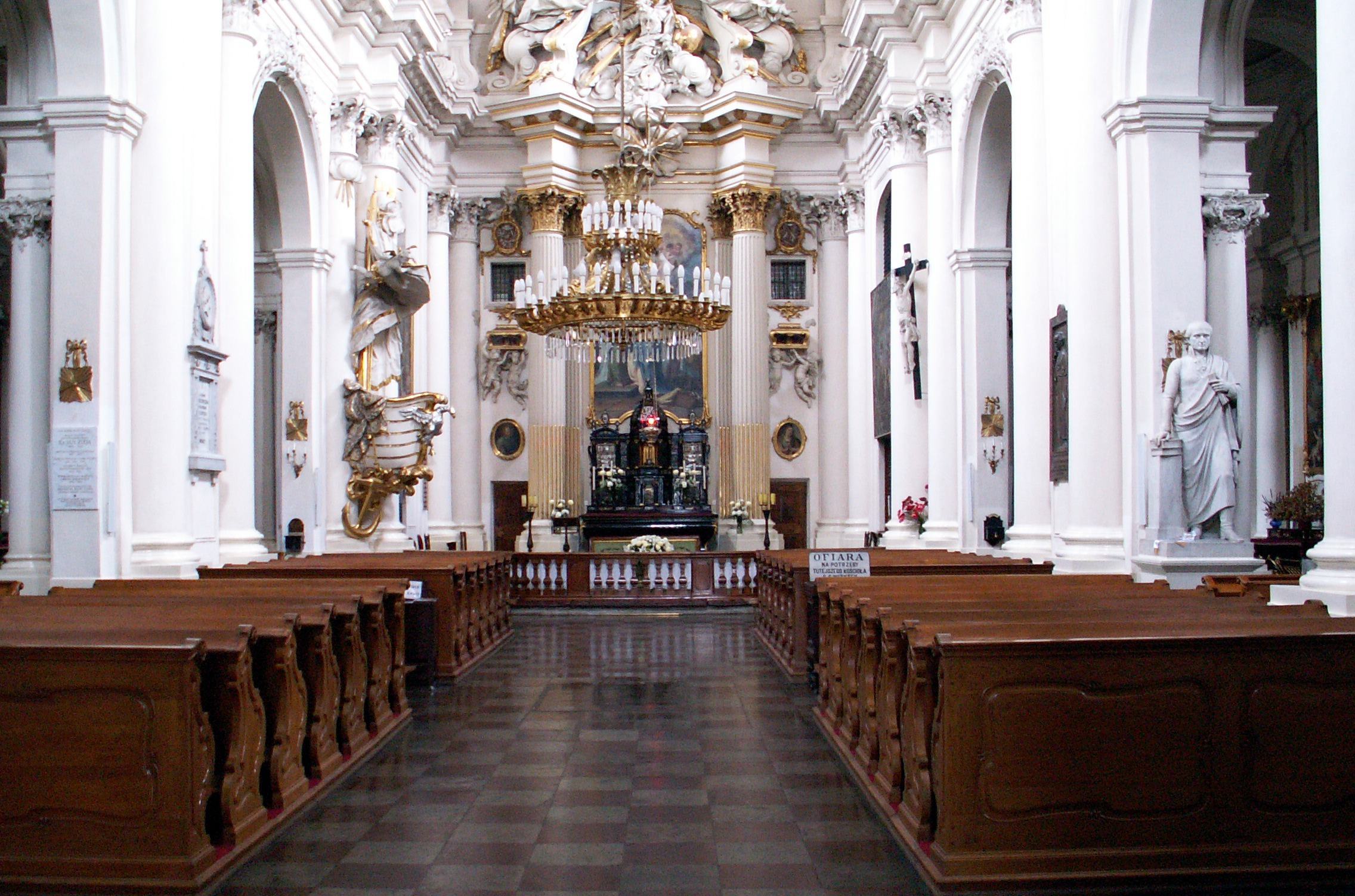 Wnętrze kościoła wizytek